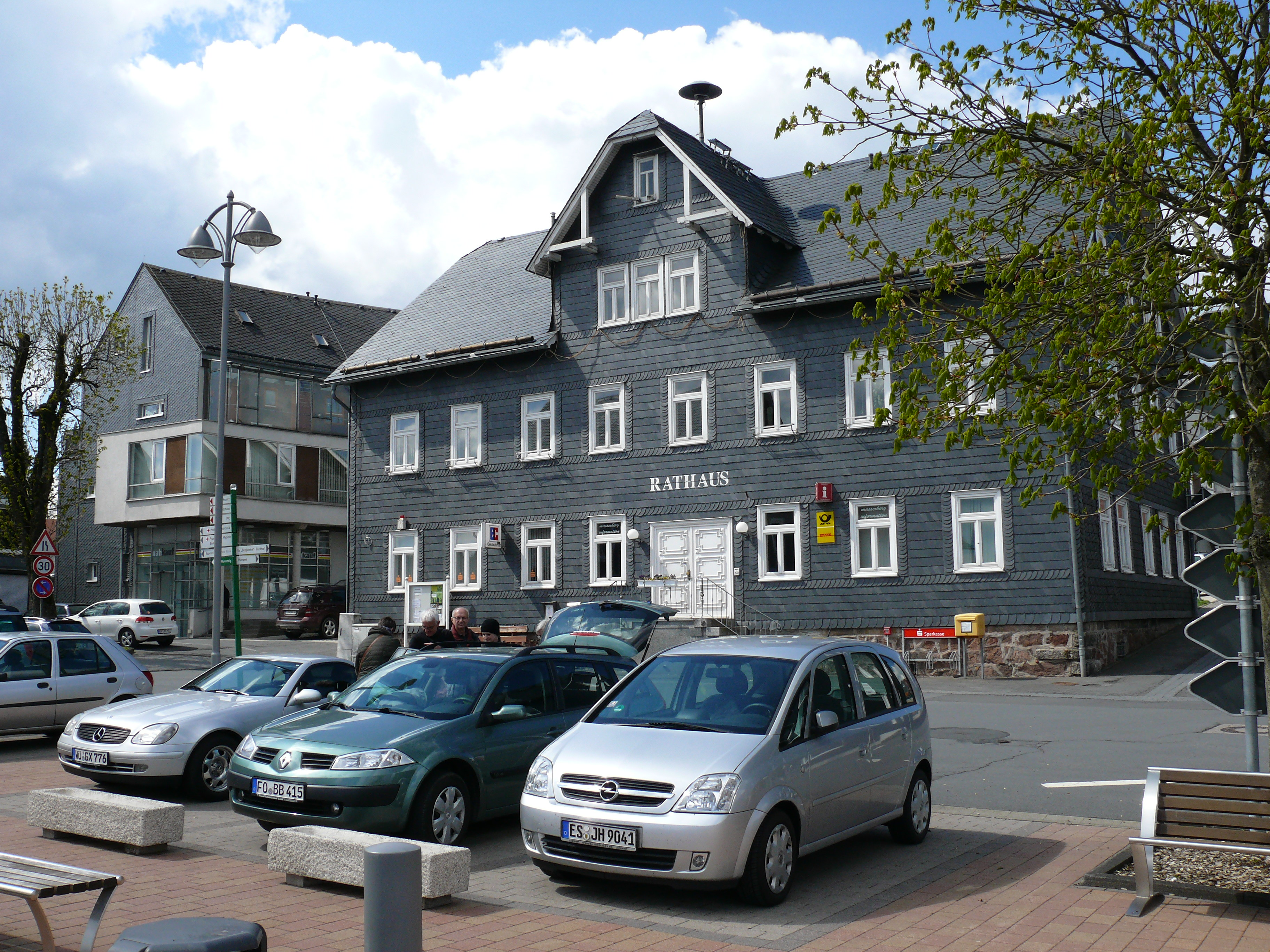 Das Rathaus im Luftkurort Masserberg in Thüringen.